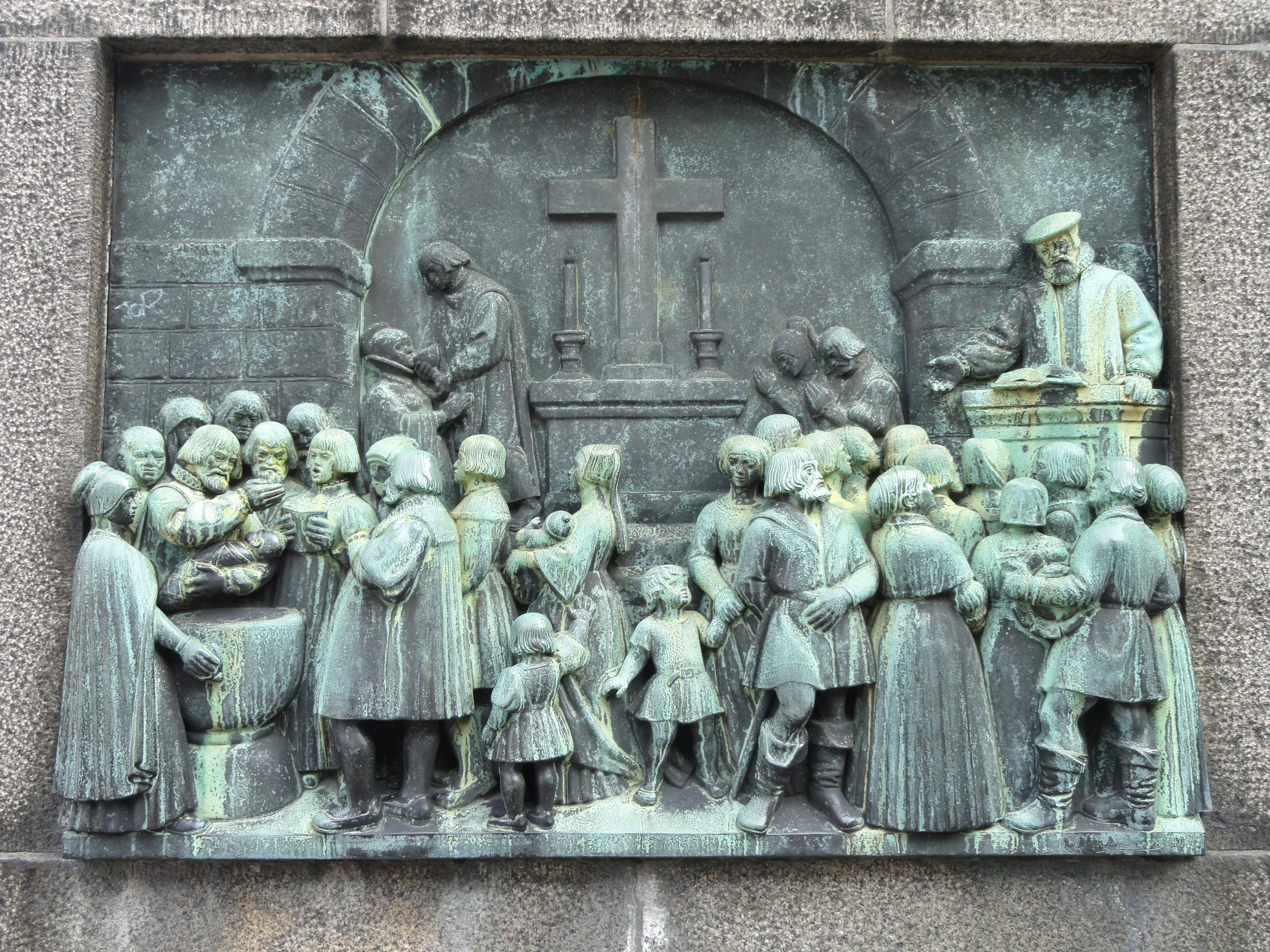 Reformationsmonumentet, Bispetorv, Copenhagen, Denmark.